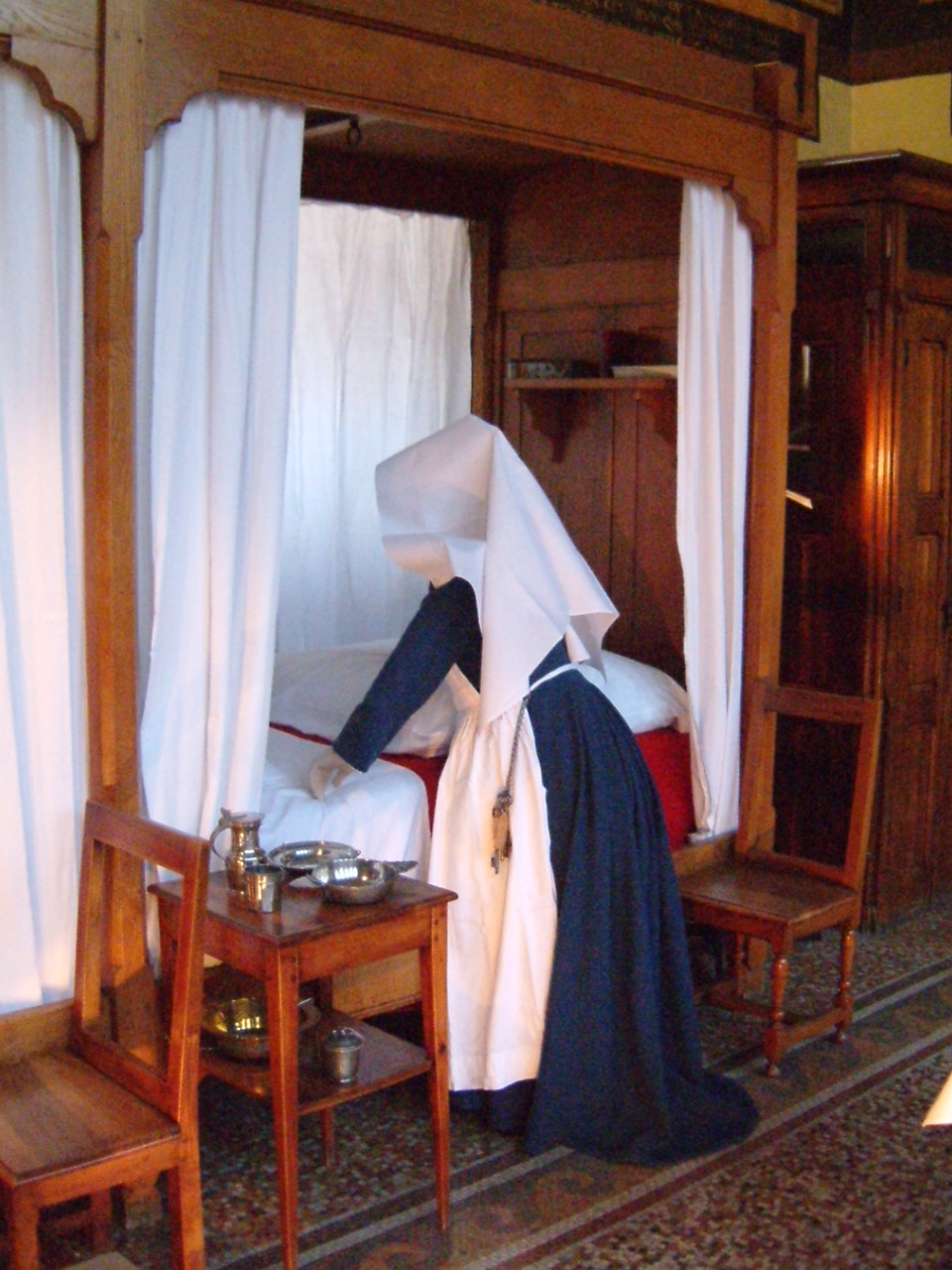 Hospices de Beaune, Bourgogne, FRANCE.